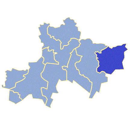 Powiat żagański - Gmina Niegosławice